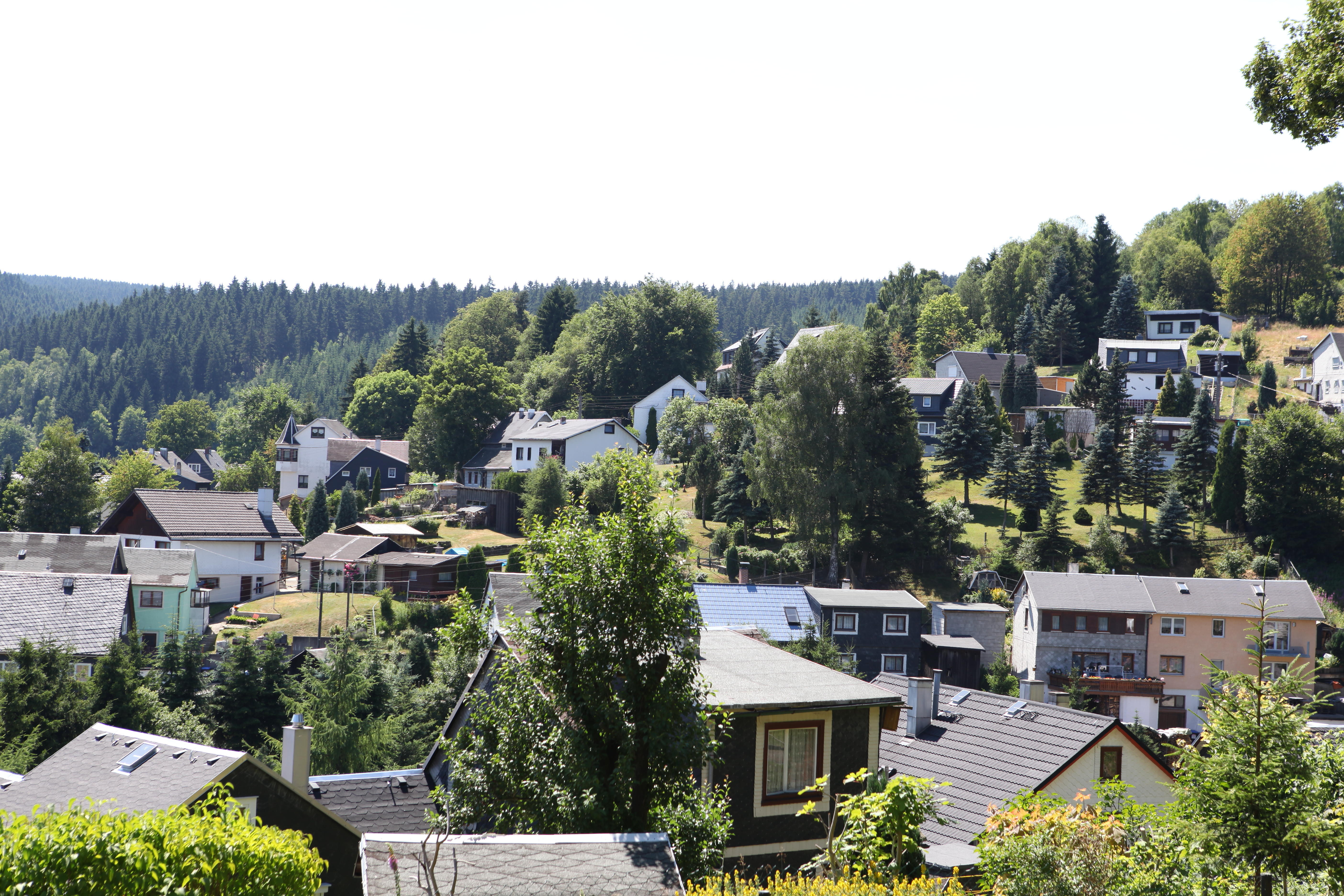 Hügel, Teil von Oberlichte im Ort Lichte